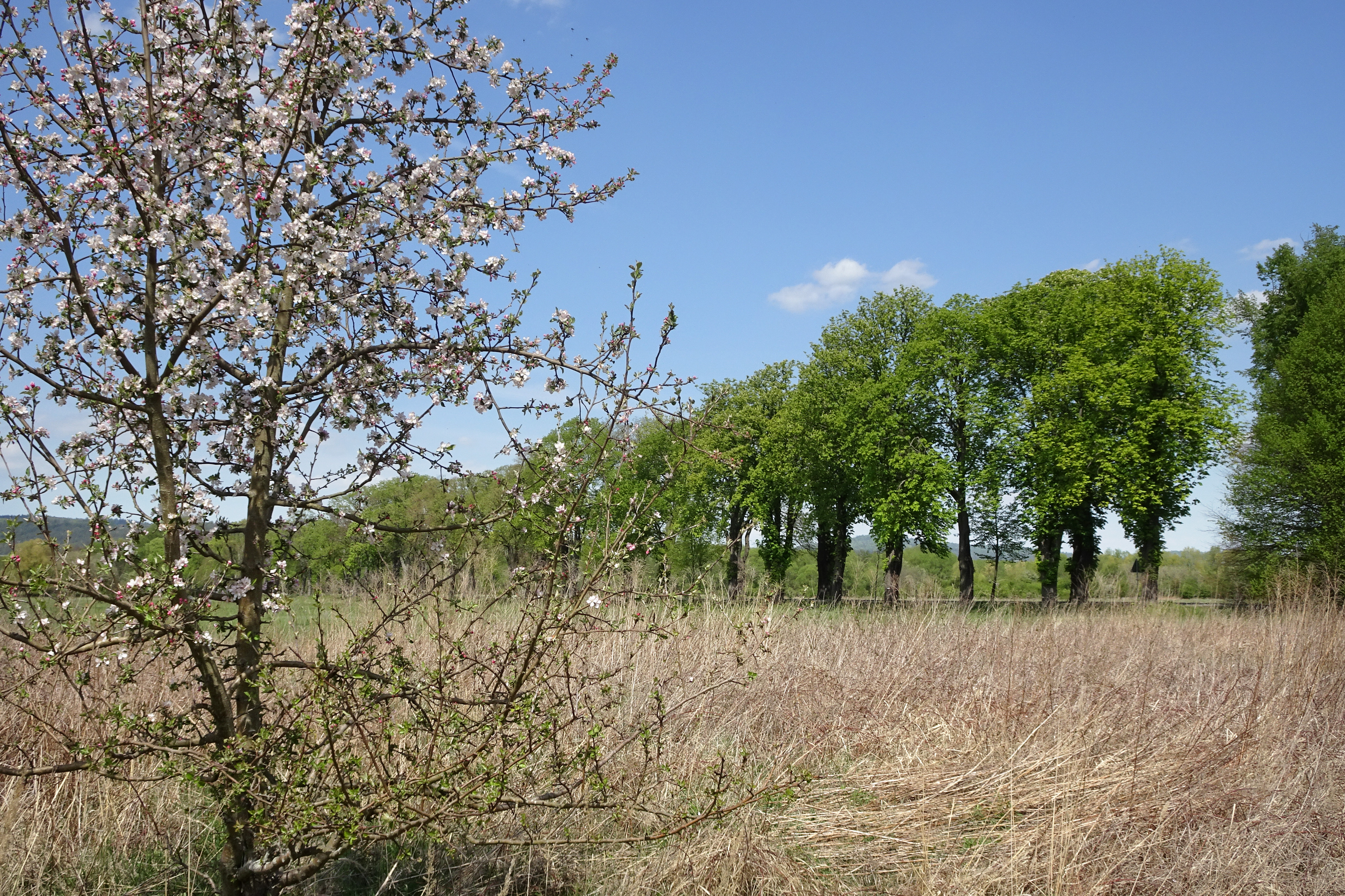 Die Obersuhler Aue im nordosthessischen Landkreis Hersfeld-Rotenburg ist ein großflächiger offener Grünlandbereich. Das durch traditionelle Beweidung und Mahd entstandene Gebiet, das mit drei Seiten an Thüringen grenzt, ist zum Lebensraum für viele schutzwürdige Pflanzen- und Tierarten geworden. Um die unterschiedlich feuchten Wiesen und Brachflächen zu bewahren und zu schützen, wurde die Aue im Jahr 1990 zum Naturschutzgebiet erklärt und später als ein Flora-Fauna-Habitat-Gebiet in dem europaweiten Netz von Schutzgebieten „Natura 2000“ verankert. Als eine von vier Teilflächen gehören die Wiesen auch zu dem Europäischen Vogelschutzgebiet „Rhäden von Obersuhl und Auen an der mittleren Werra“, das als wichtiges Brut- und Rastgebiet für bestandsgefährdete Vogelarten gilt.